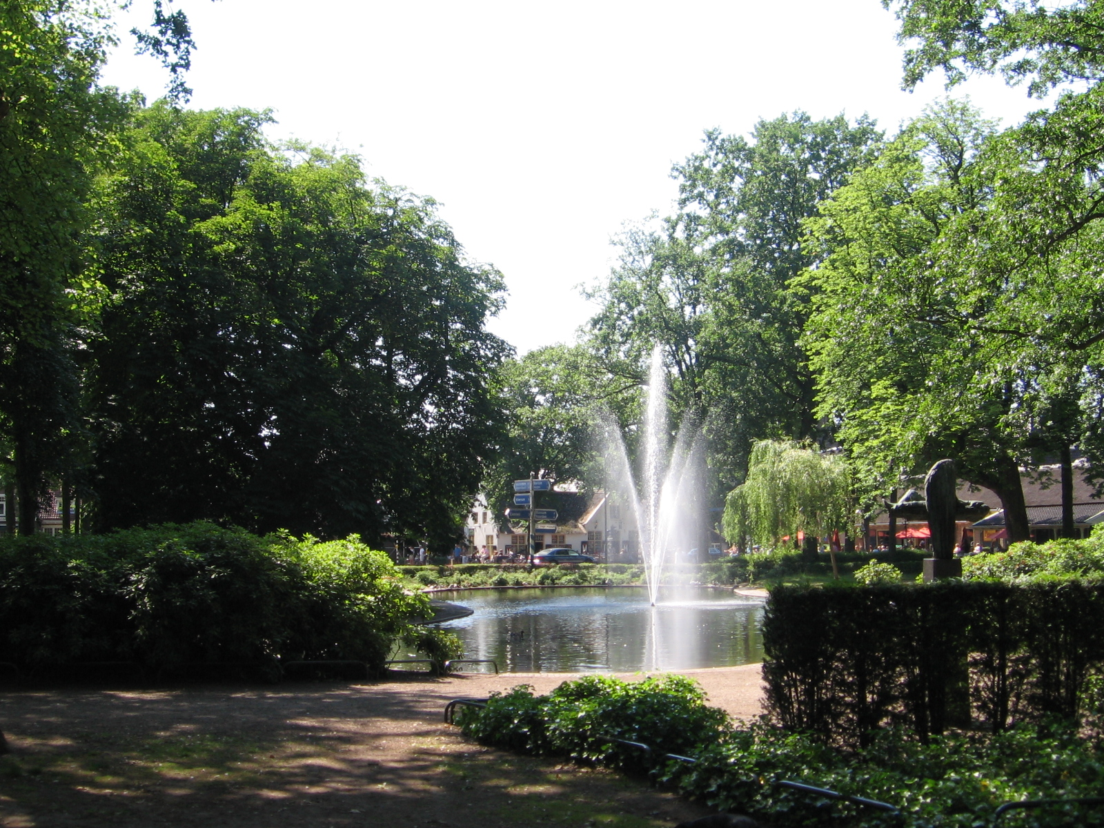 Laren,Brink, juni 2006